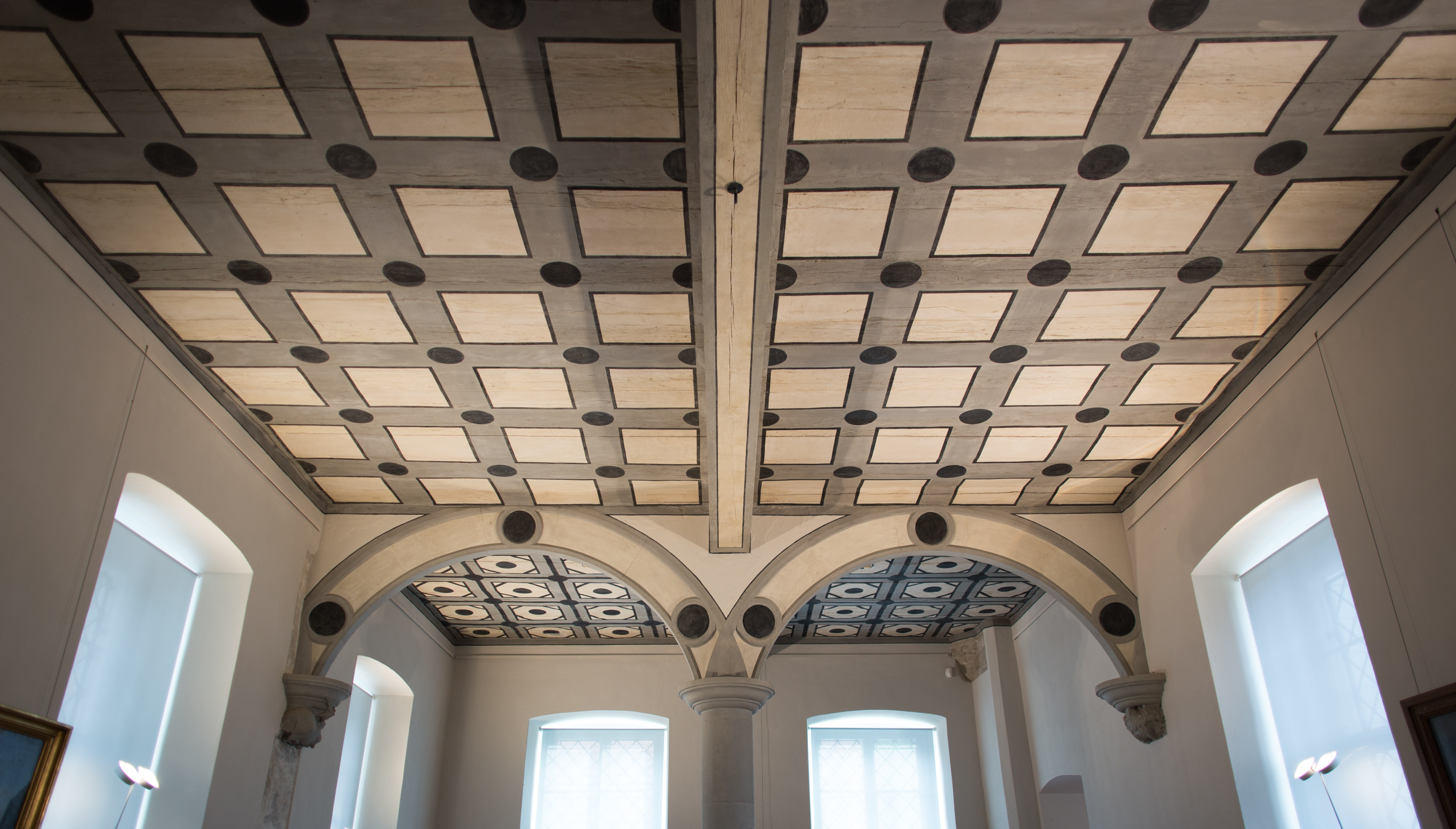 Historische Decke im Jagdschloss Grunewald